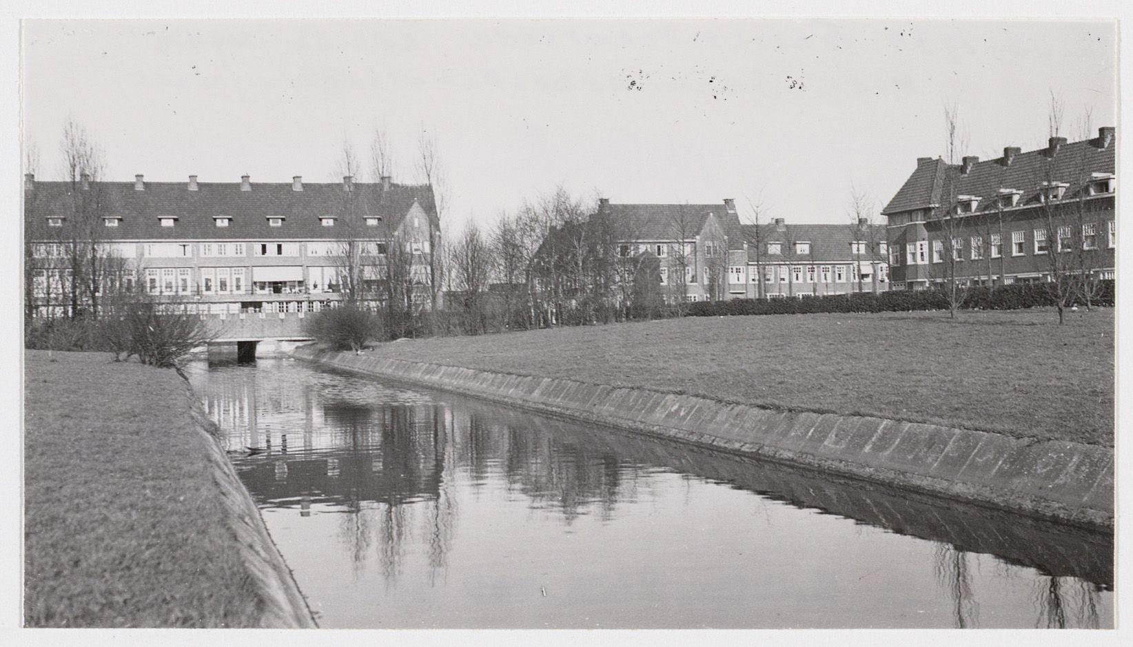 Beschrijving Galileiplantsoen Gezien in noordoostelijke richting. Rechts hoek Archimedesplantsoen; brug 336 aan het eind Documenttype foto Vervaardiger Eck, J. van (Jacobus, 1873-1946) Collectie Collectie J. van Eck: foto's Datering 20 maart 1938 Geografische naam Archimedesplantsoen Galileïplantsoen Inventarissen Afbeeldingsbestand A01634001068 Generated with Dememorixer